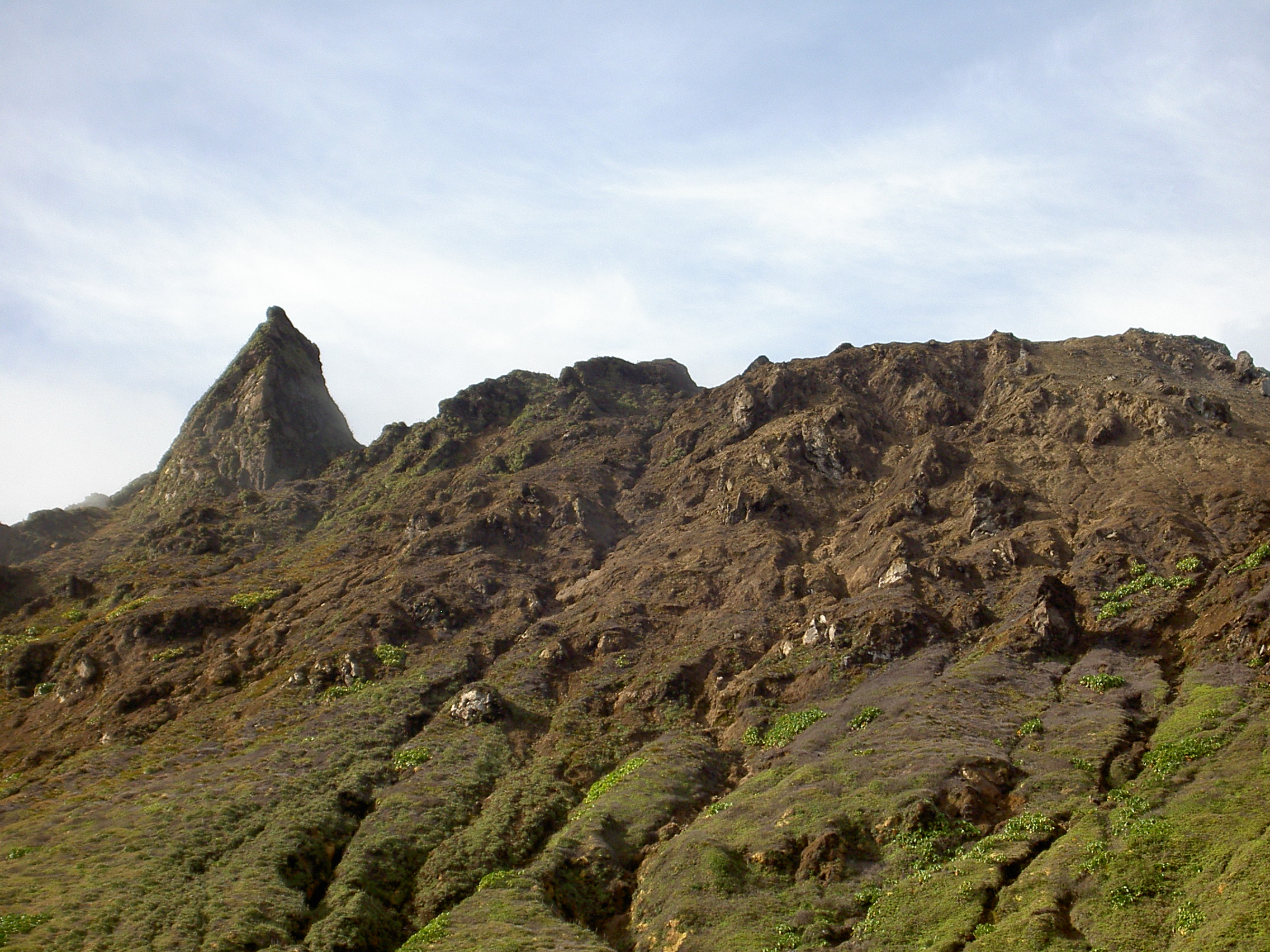 Sommet de la Soufrière 1467m - Guadeloupe